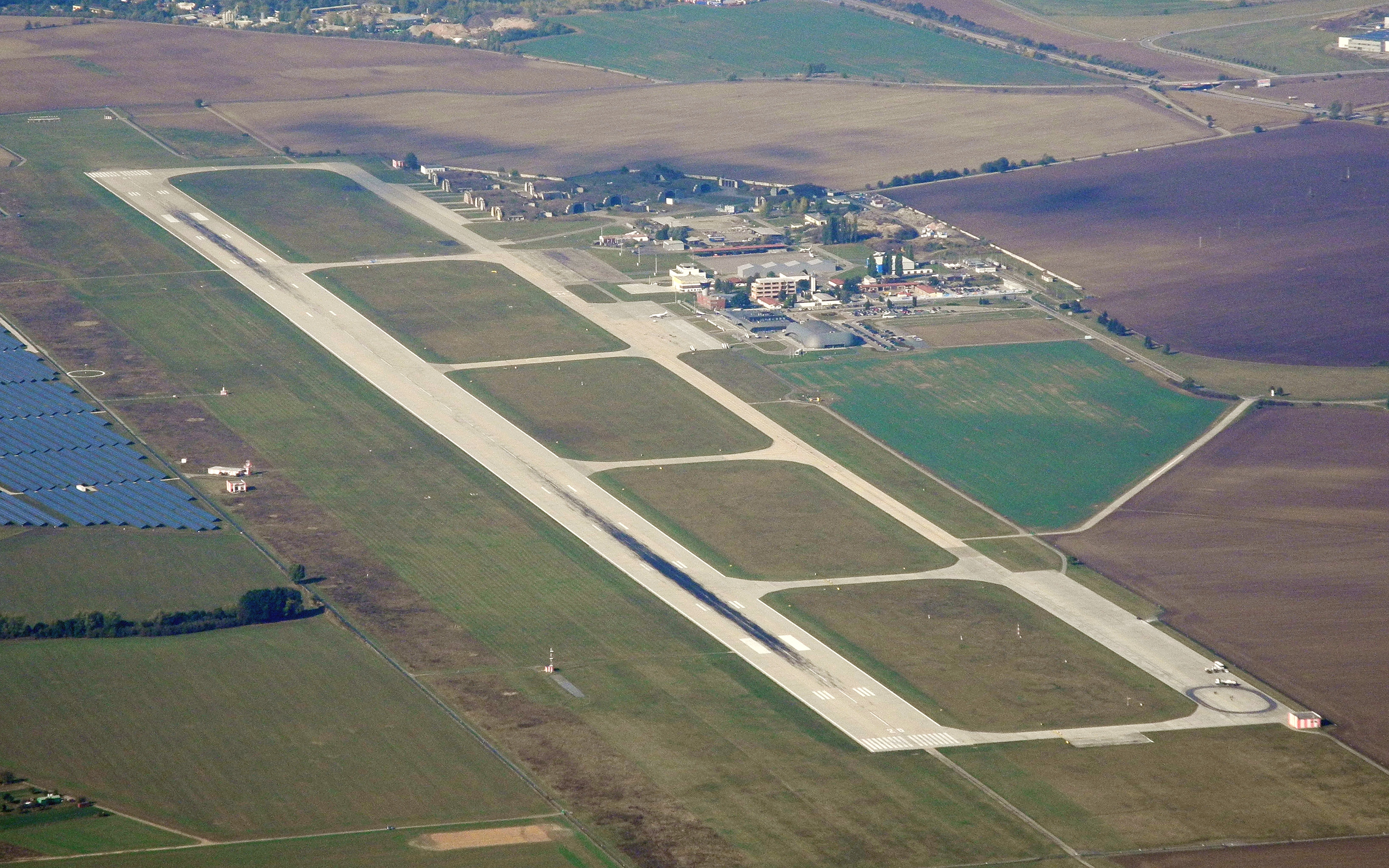 runway 28